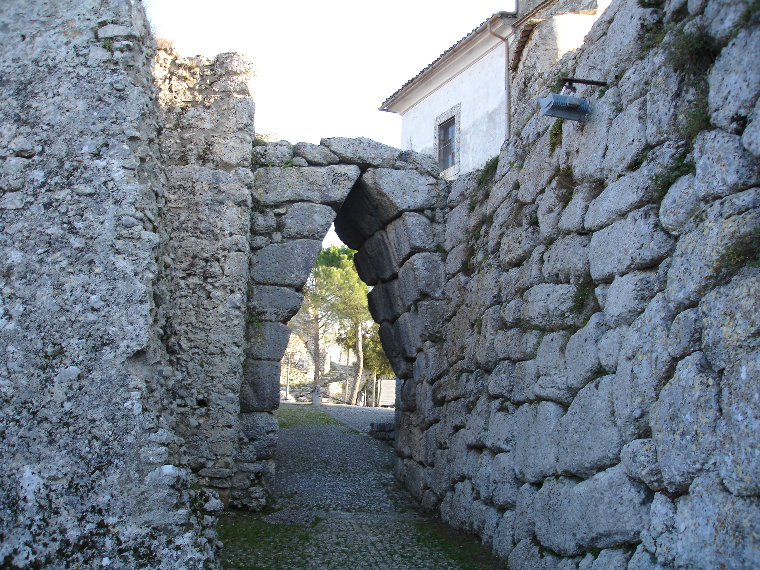 Portal triangular na cidade de Arpino, Itália. Único restante no mundo